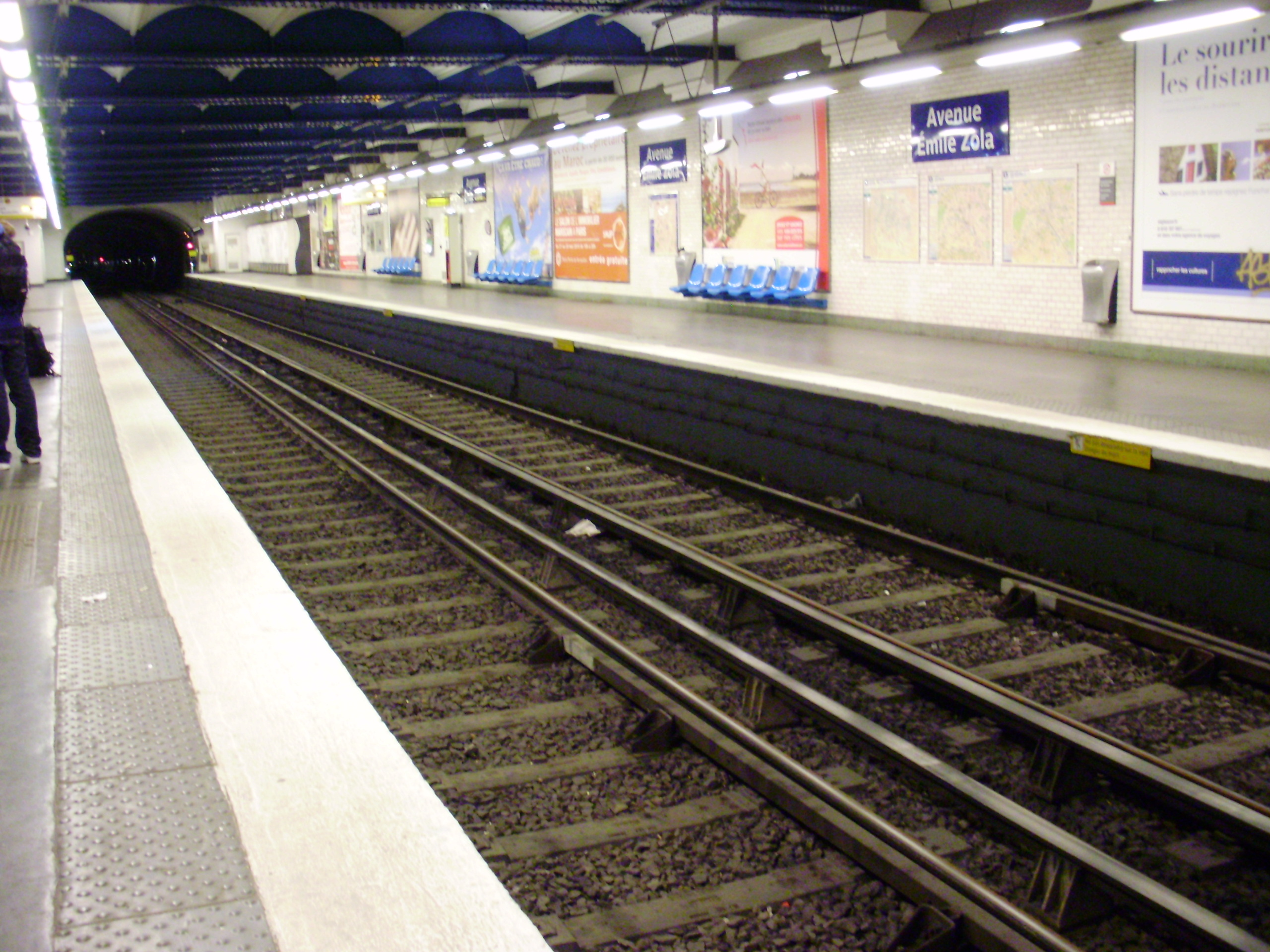 Quais de la station « Avenue Émile Zola » du métro de Paris (à droite vers Boulogne)